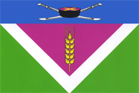 Флаг станицы Новолеушковская Павловского района Краснодарского края